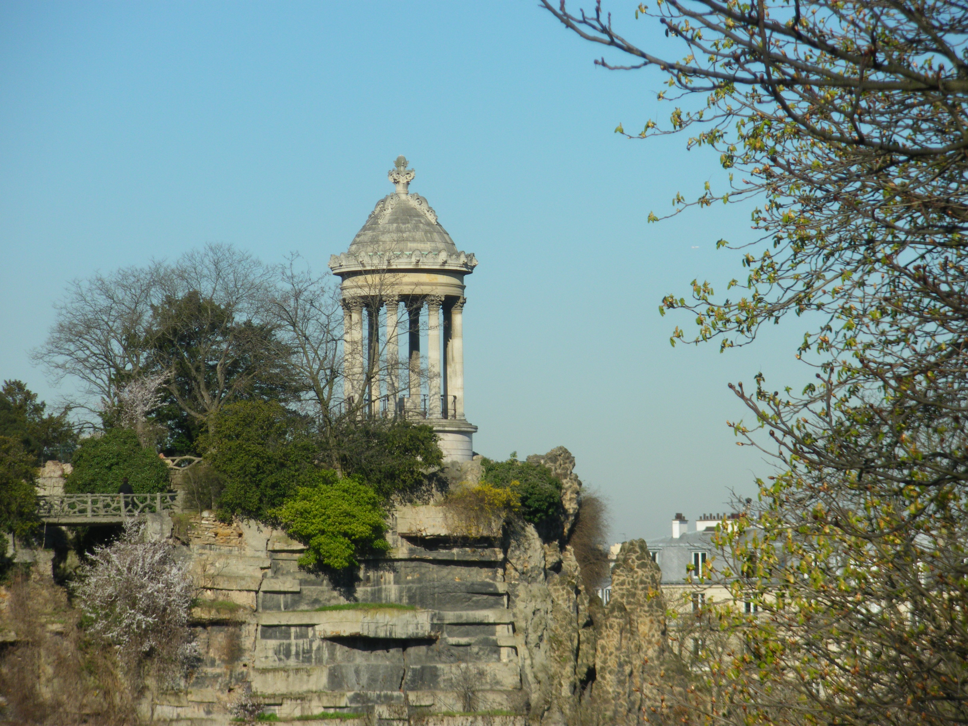 Belvédère du Parc des Buttes Chaumont, Paris, France